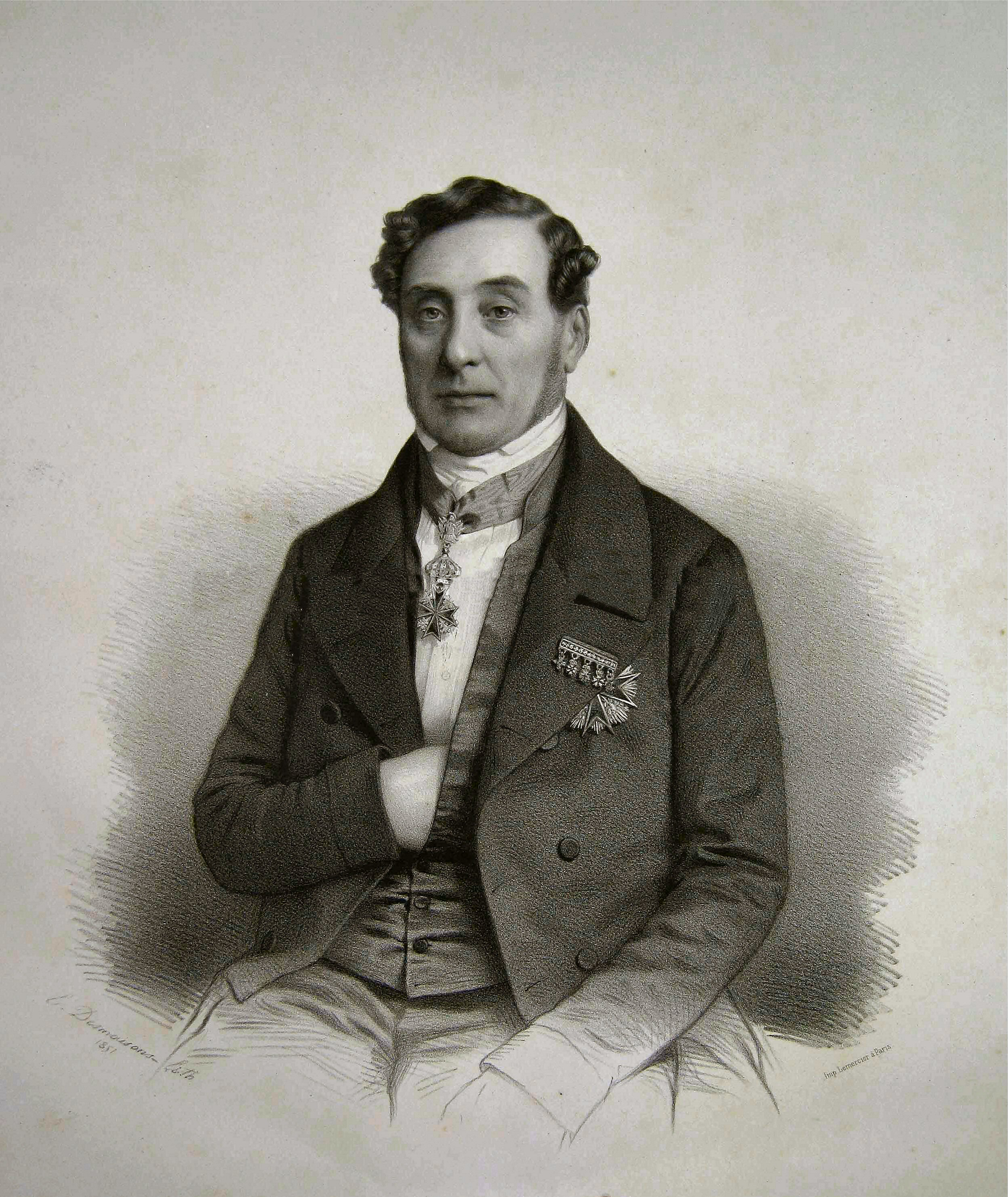 Ritratto di Floriano Francesco De Larderel